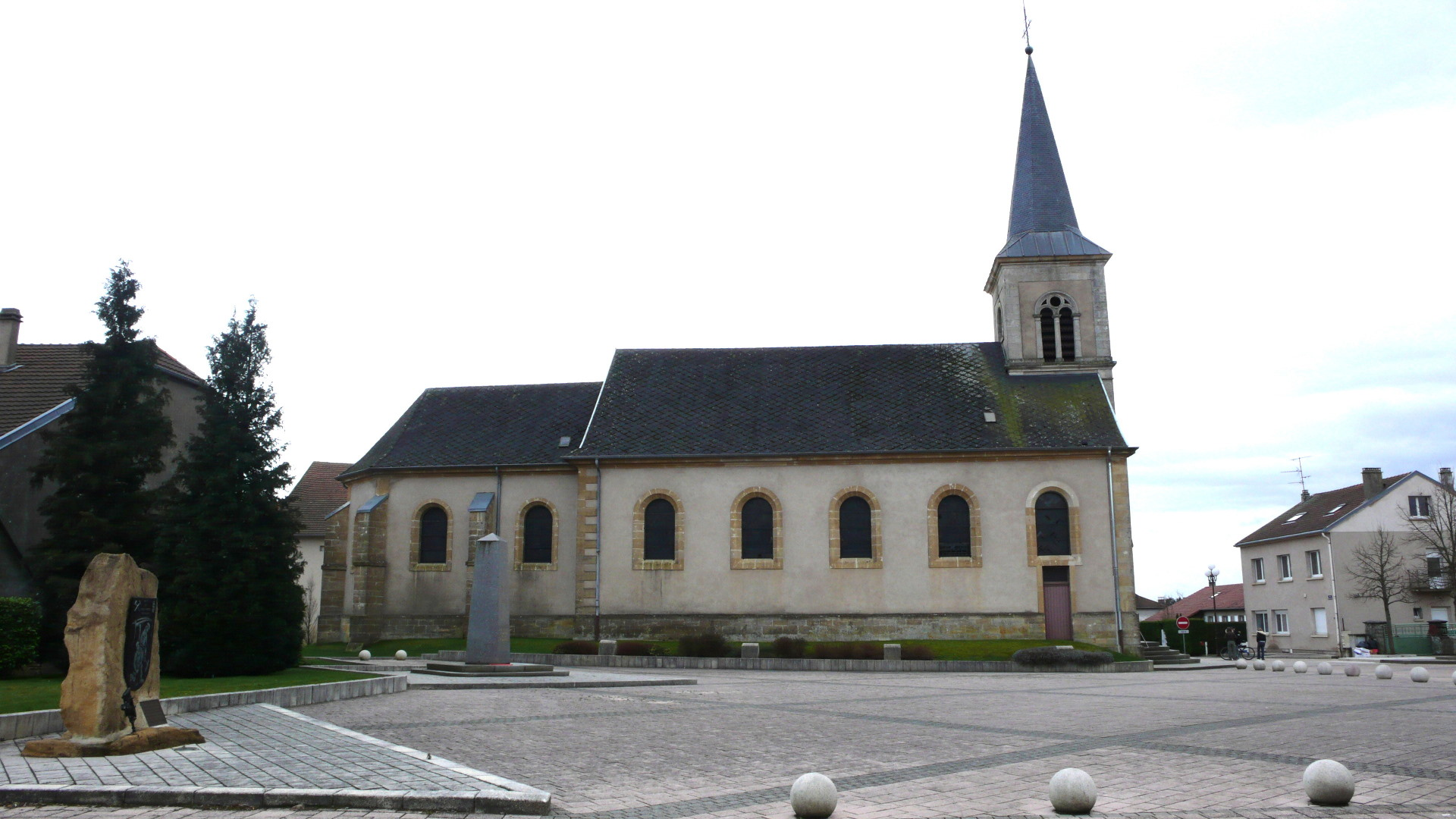 Kierch Tressange.